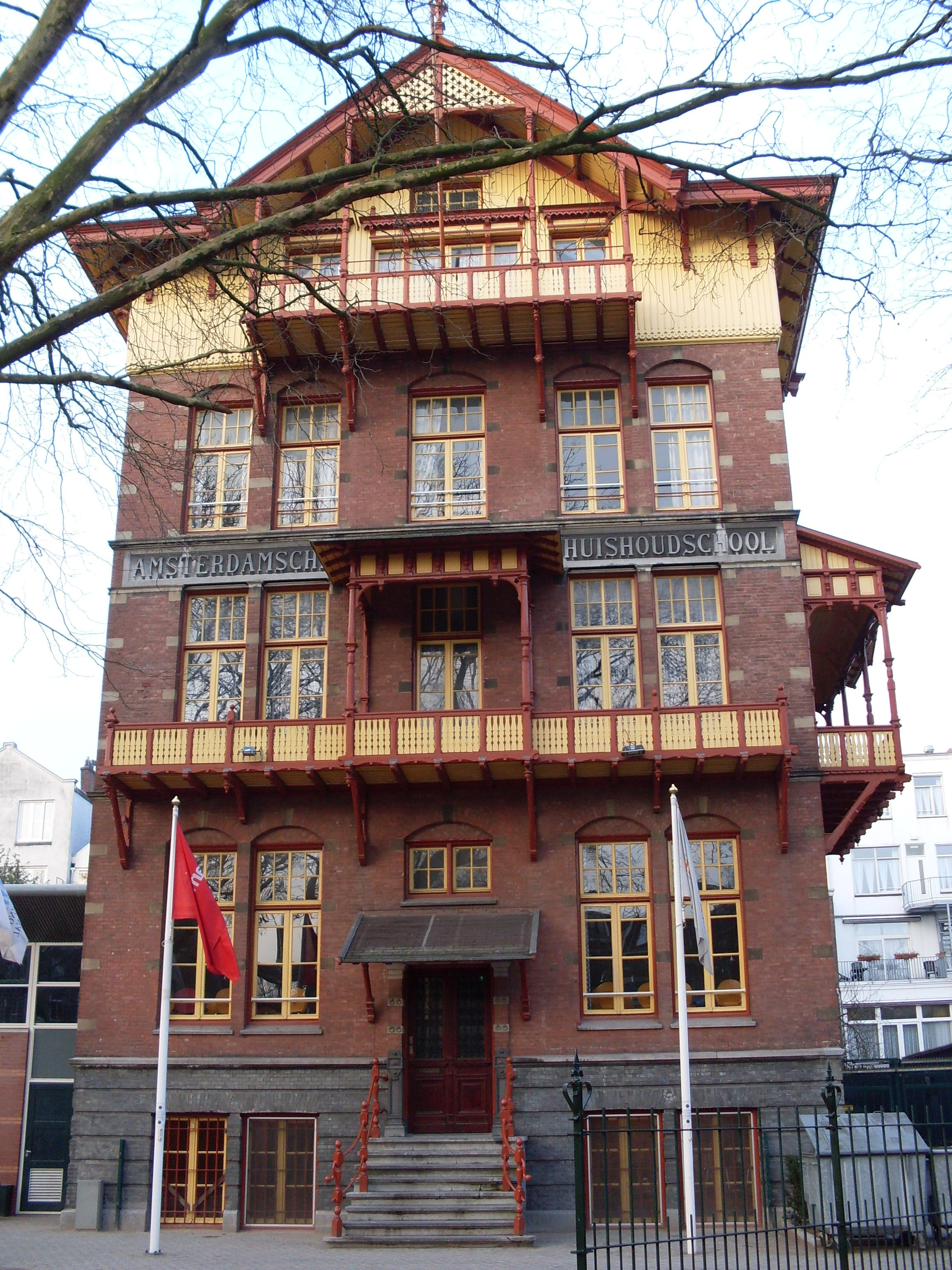 Voormalig Amsterdamse huishoudschool, zandpad 5, Amsterdam.